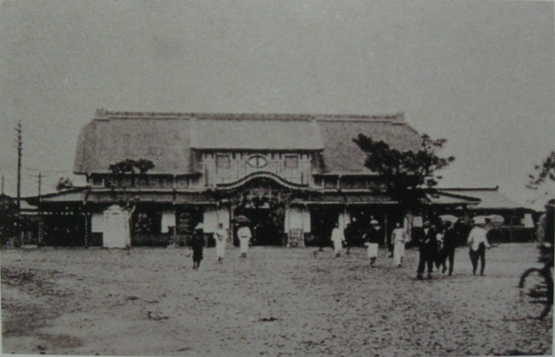 日本時代的宜蘭驛